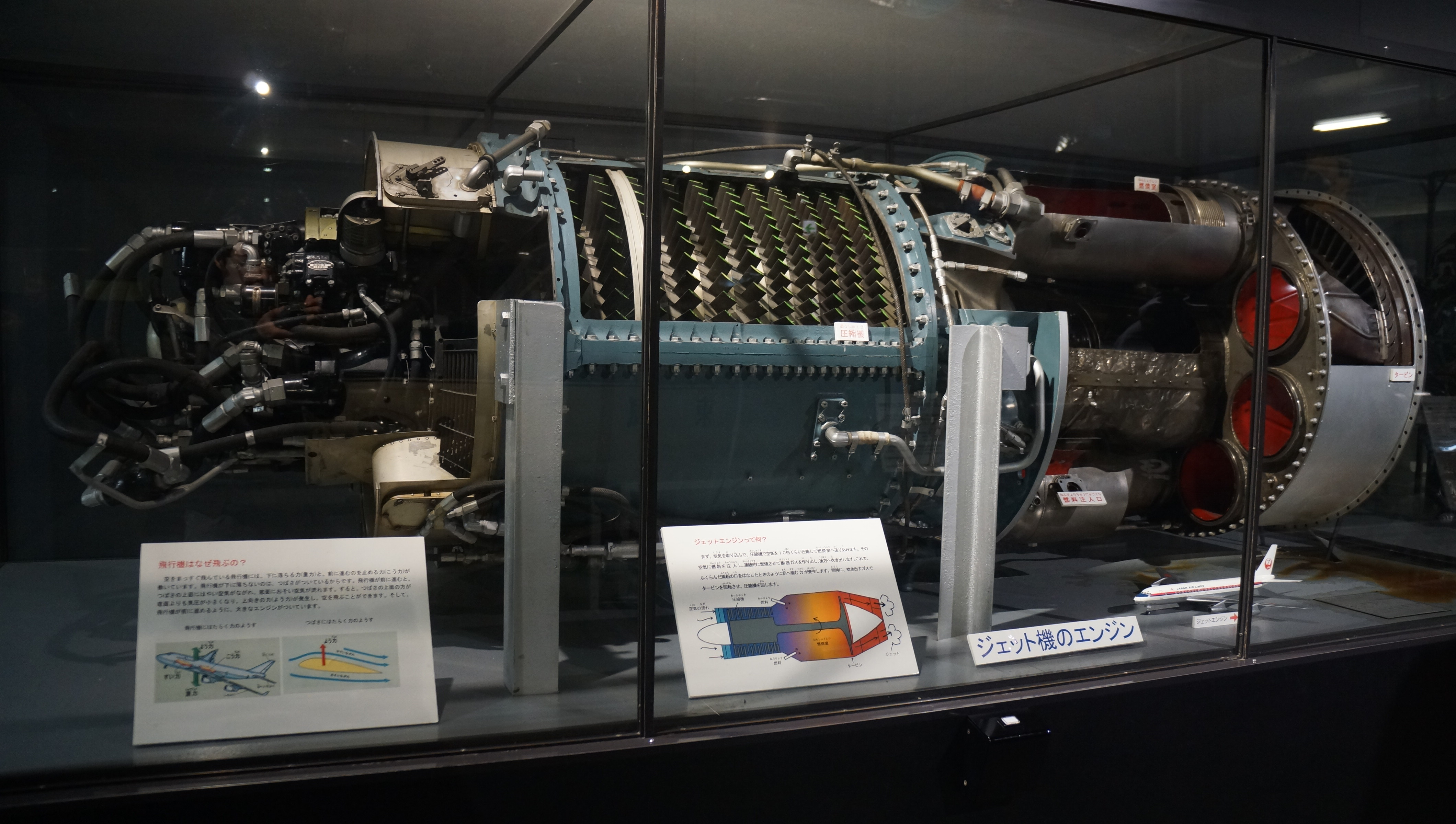 アリソン J35ターボジェット・エンジン（カットモデル）。2014年3月23日 交通科学博物館内にて。